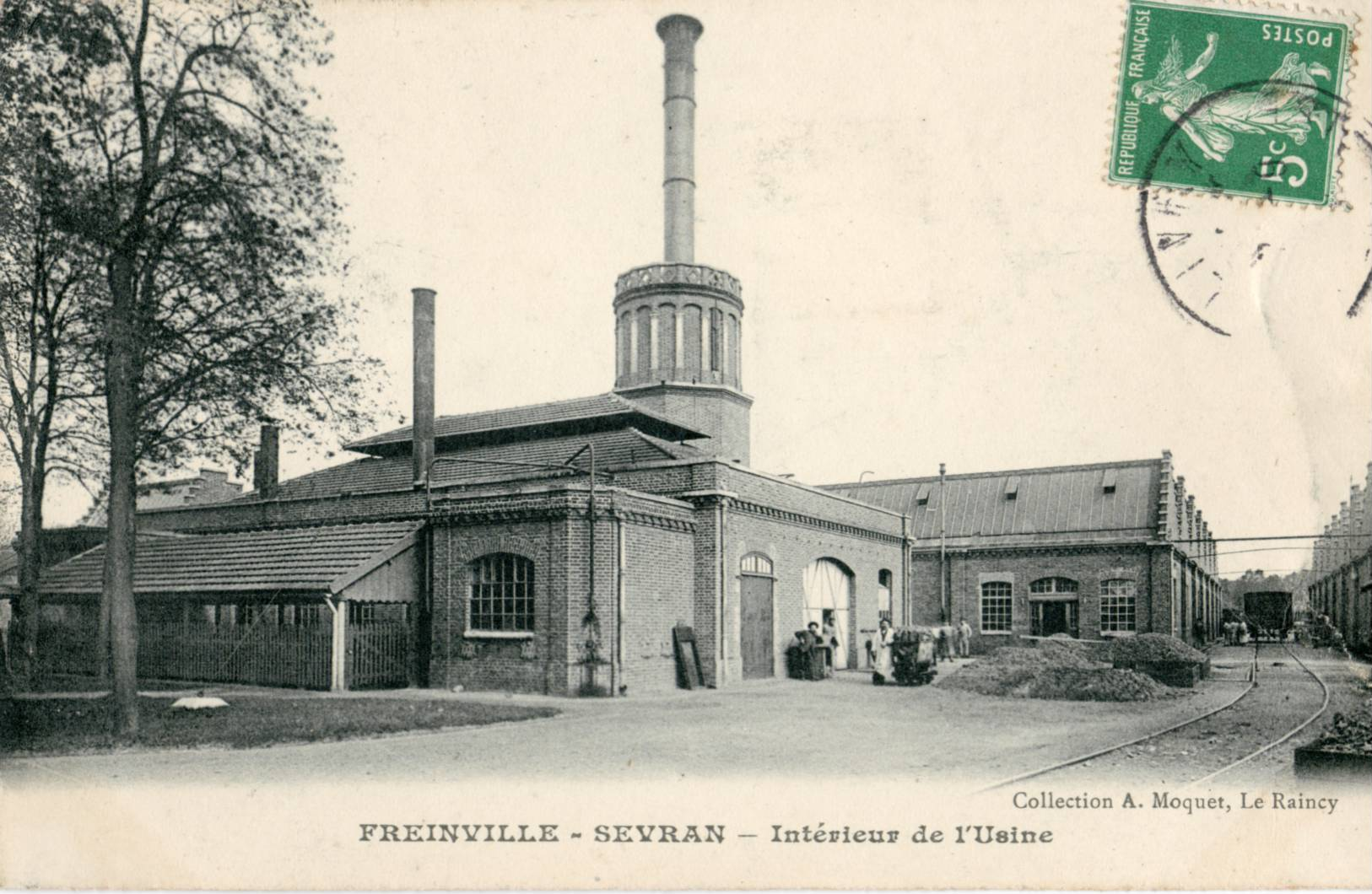 Carte postale ancienne éditée par MoquetFREINVILLE-SEVRAN : Intérieur de l'UsineUsine de freins ferroviaires Westinghouse à Sevran (93 - France) Un embranchement particulier desservait l'usine de Westinghouse.